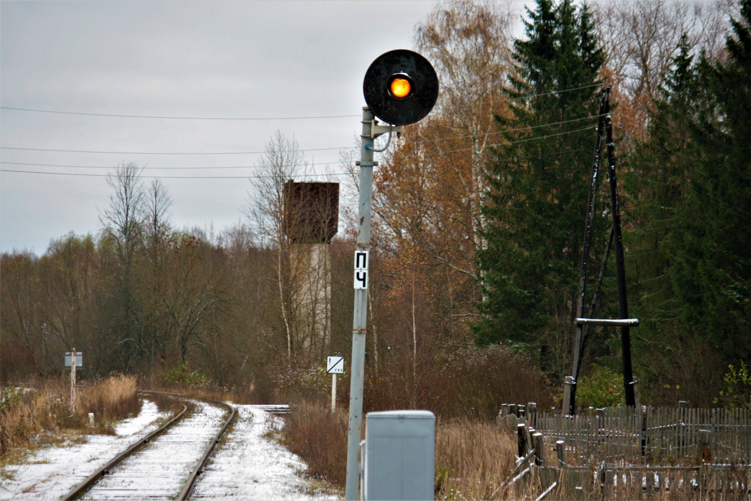 Предупредительный прожекторный светофор (мачтовый).